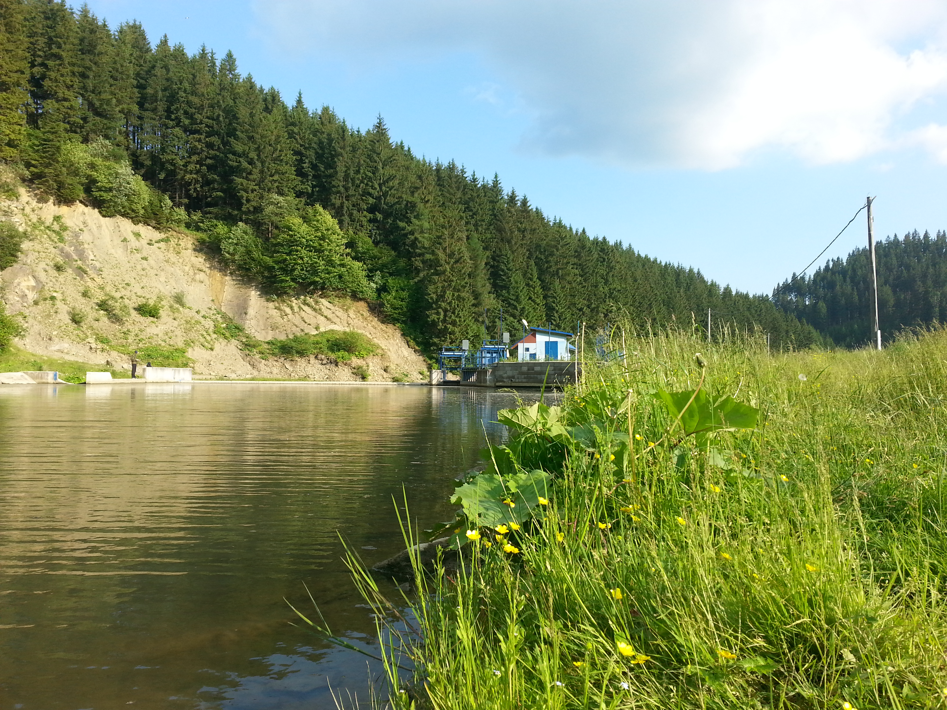 Small hydro plant Lomná